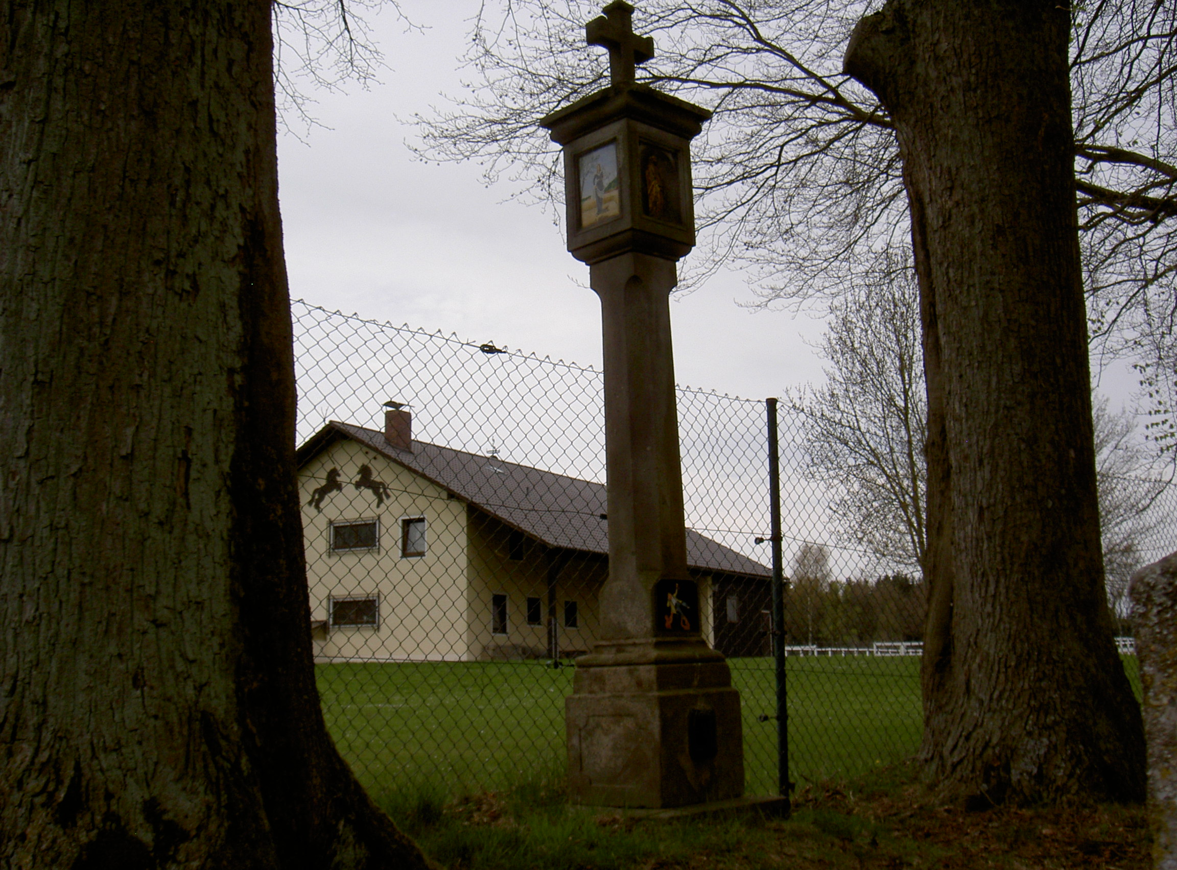 Fuchs'n Marterl in Braunetsrieth